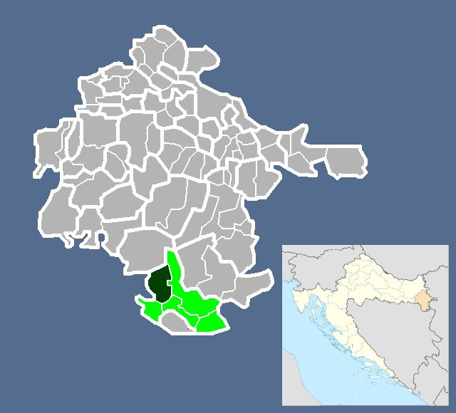 Српски (ћирилица): Вуковарско-сремска жупанија- Посавски Подгајци.